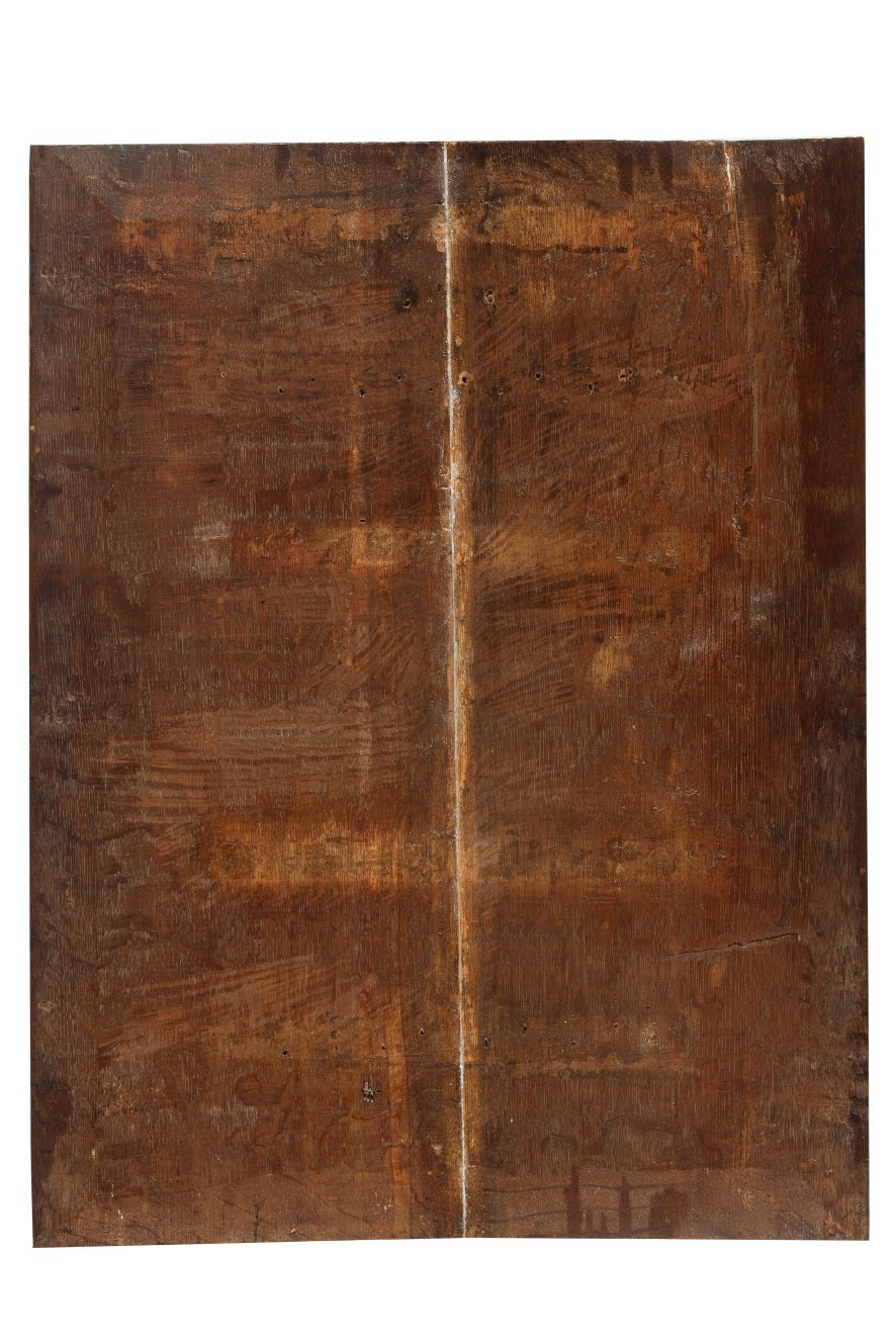 Gemonogrammeerd en gedateerd rechtsonder: RHL [Rembrandt Harmenszoon Leidensis] 1626.